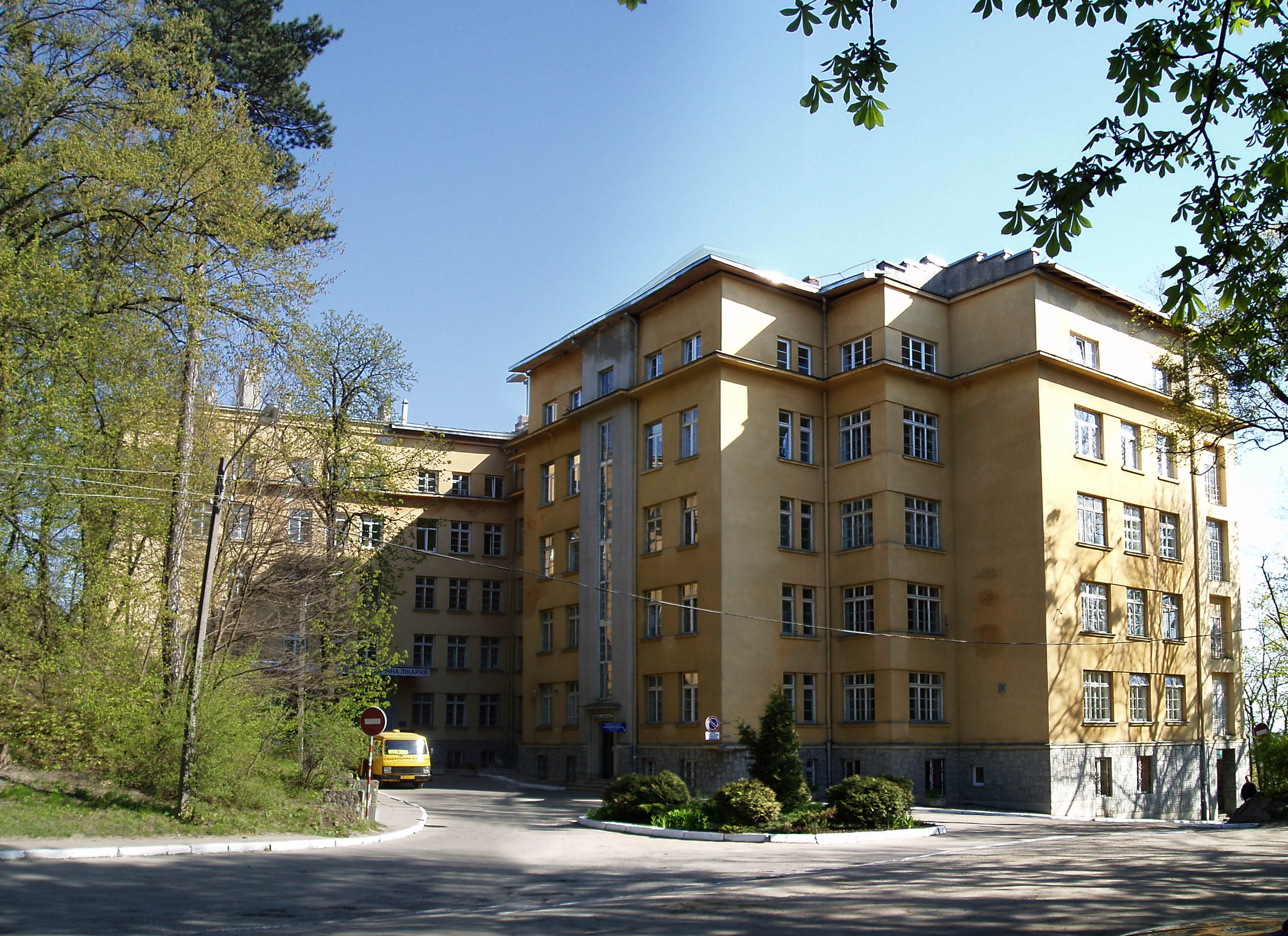 Лікарня "ОХМАТДИТ" на вулиці Лисенка у Львові, 31. Архітектор Адольф Каменобродський. 1930-ті роки.